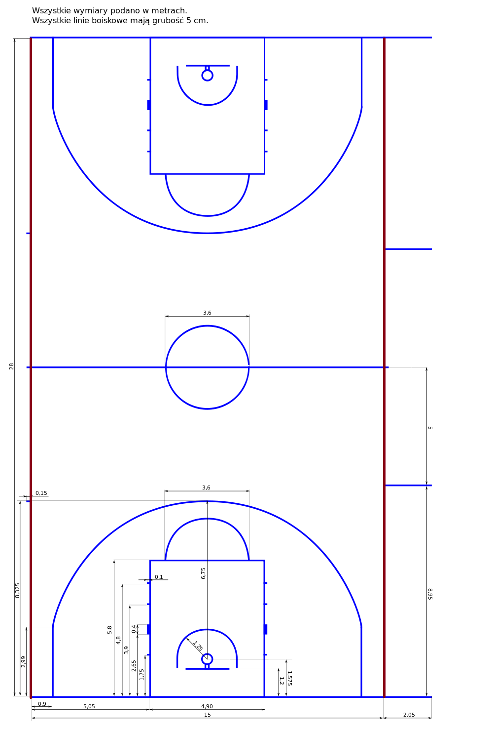 boisko do koszykówki